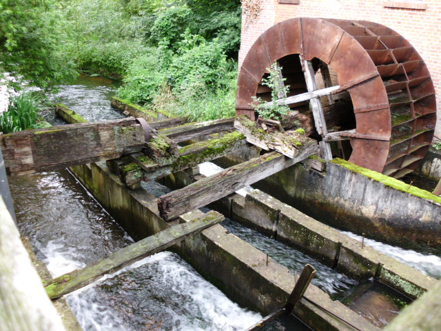 Wassermühle